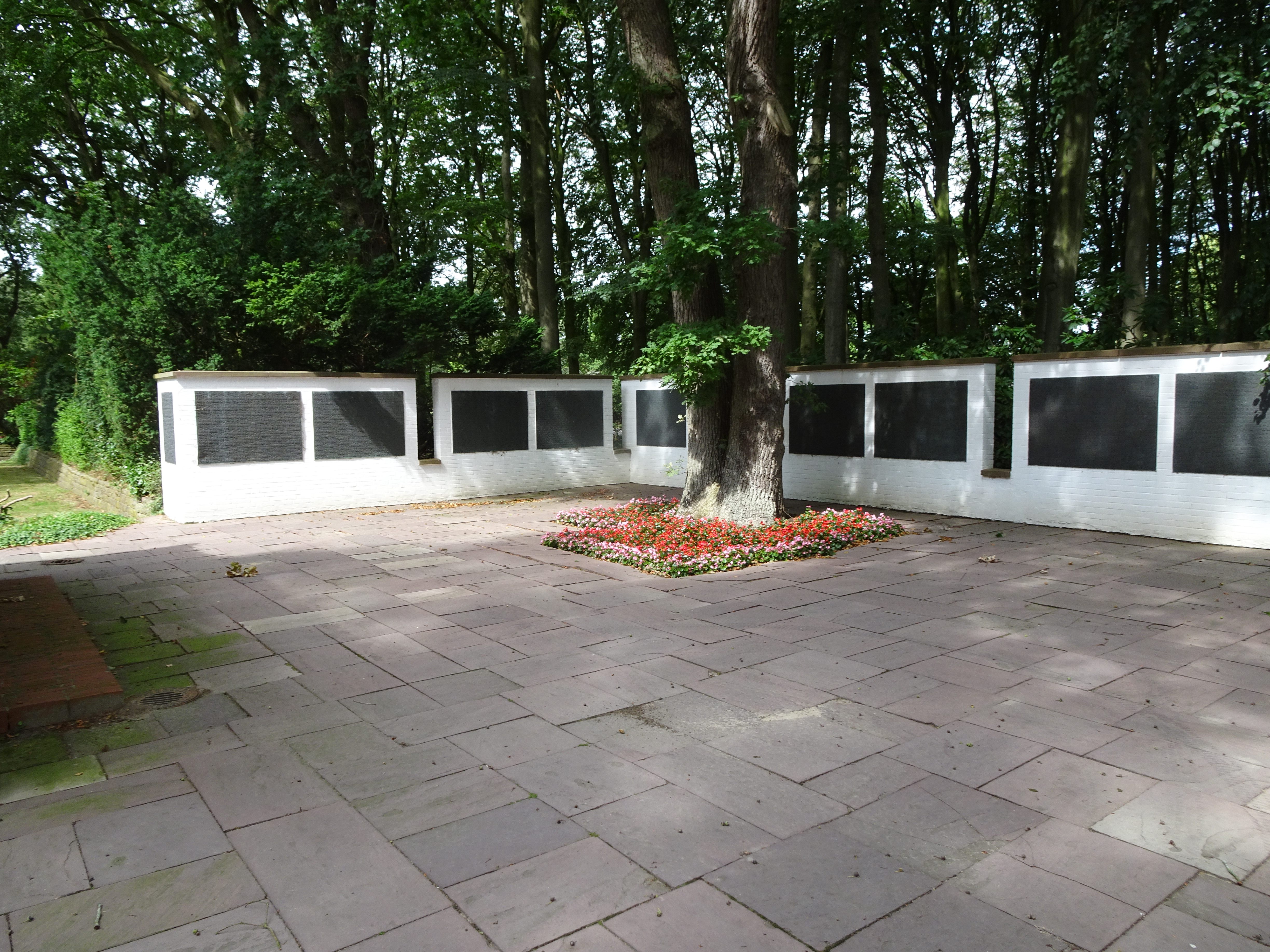 Friedhof Brockeswalde in Cuxhaven